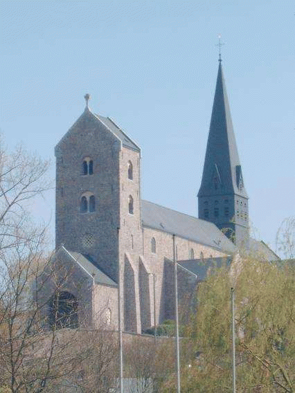 Collégiale Saint Ursmer à Lobbes, Belgique